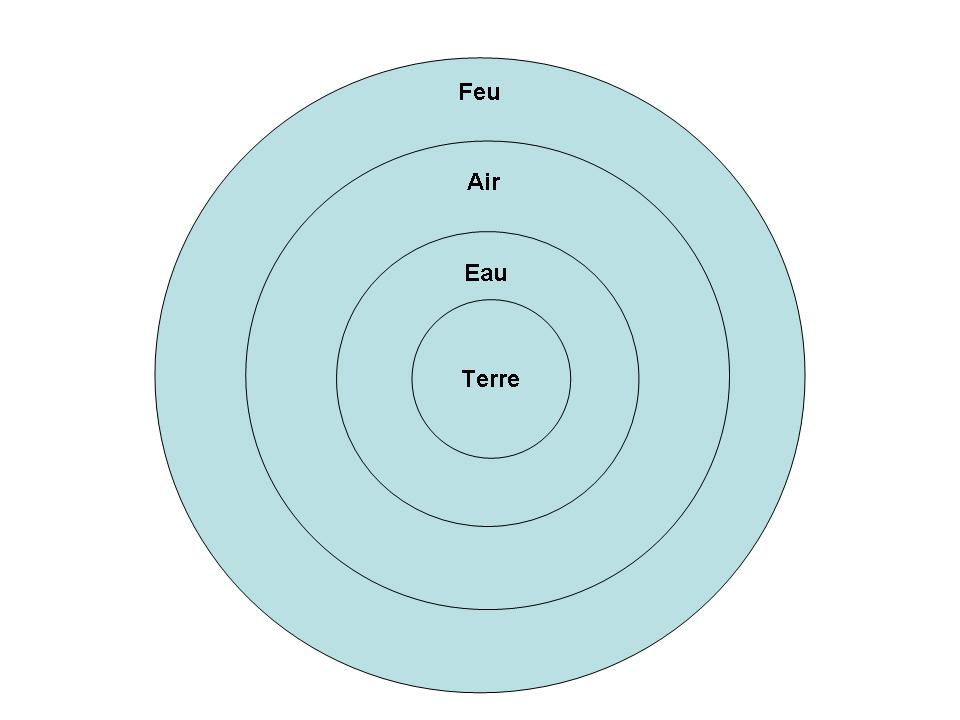 Répartition des quatre éléments de la théorie classique d'Aristote suivant leur zones de présence habituelle disposées en sphères concentriques